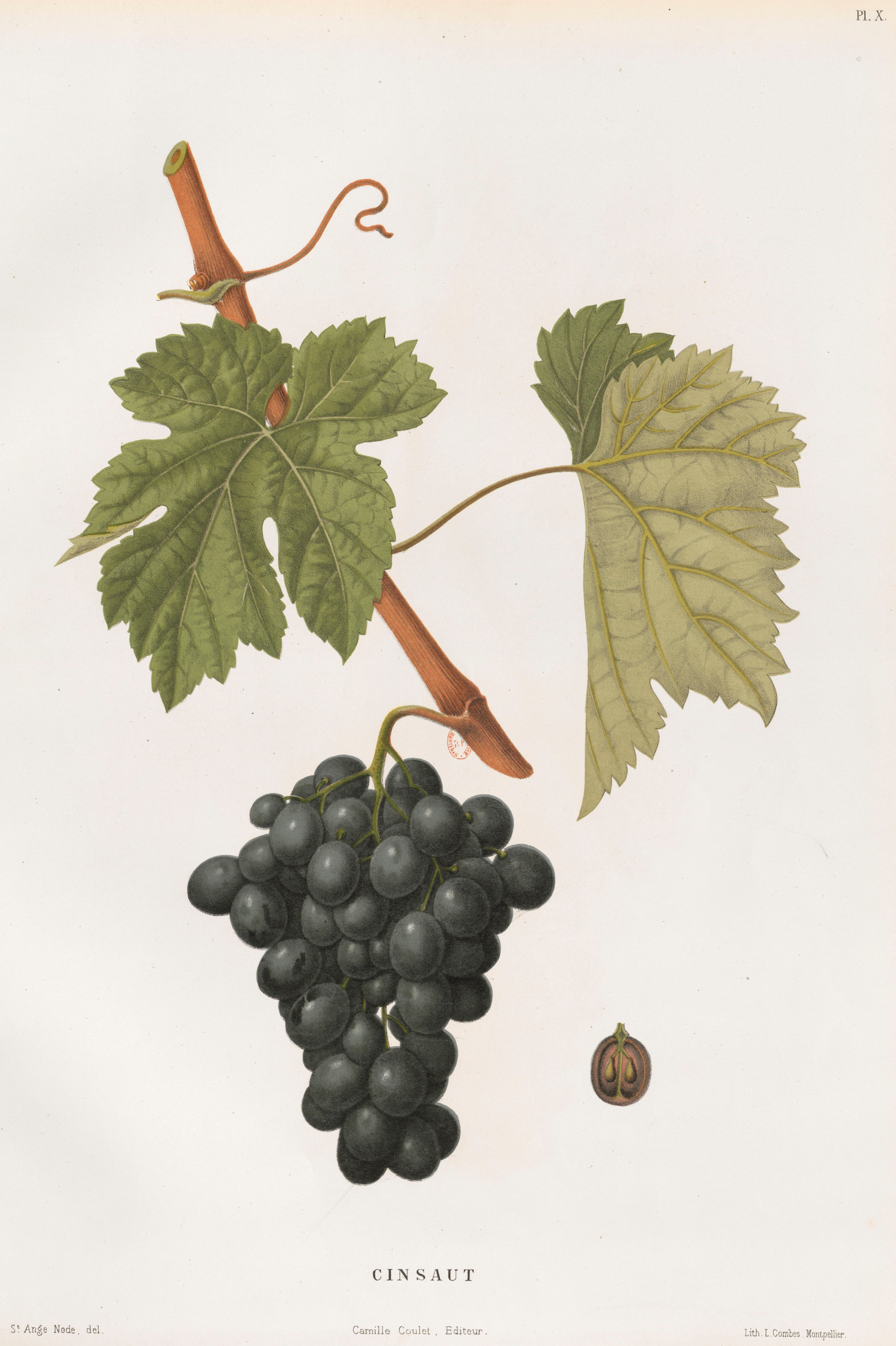 Lithographie du cépage Cinsault